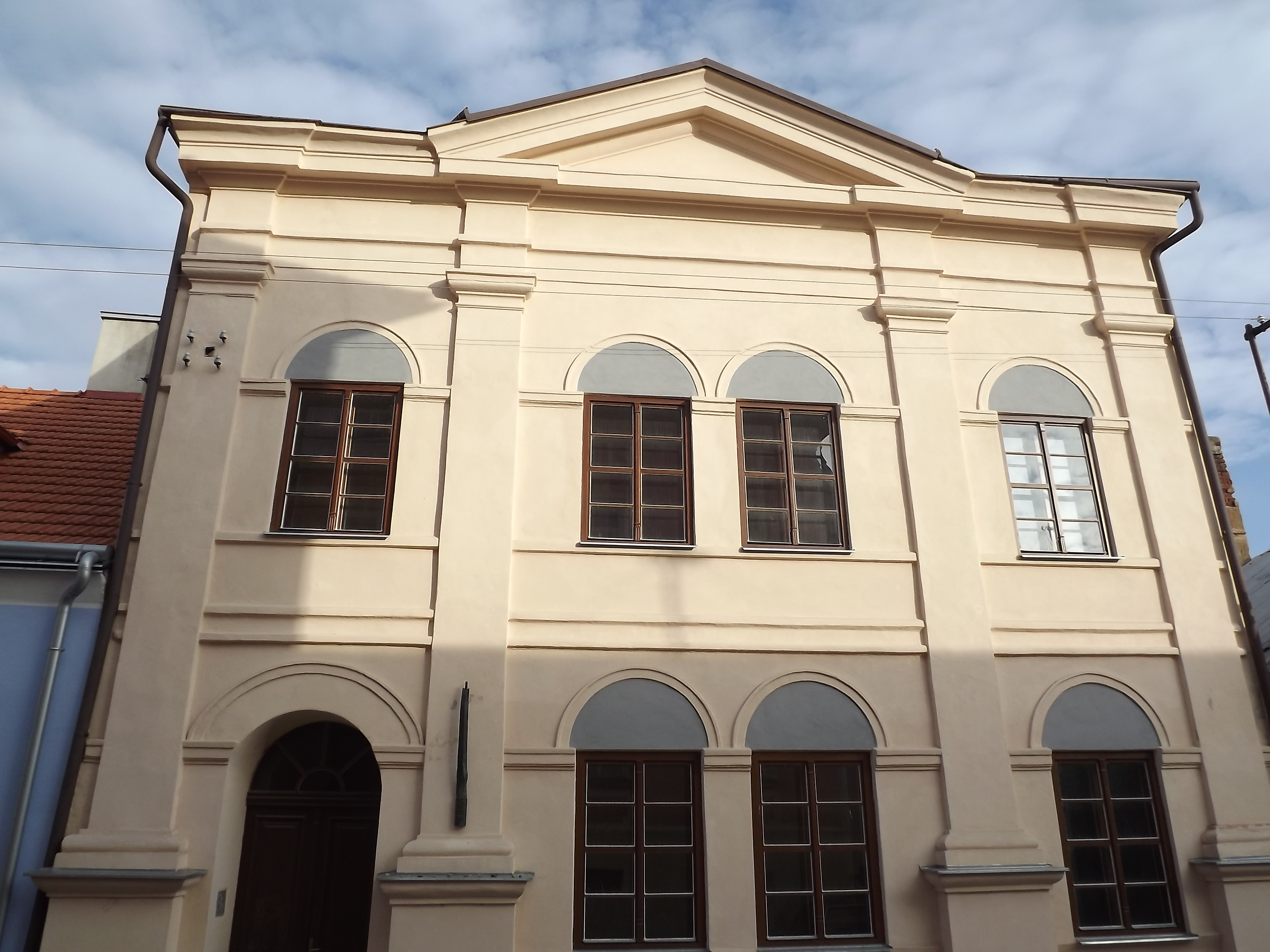 Synagoga (Slavonice), Jana Švermy 494, Slavonice